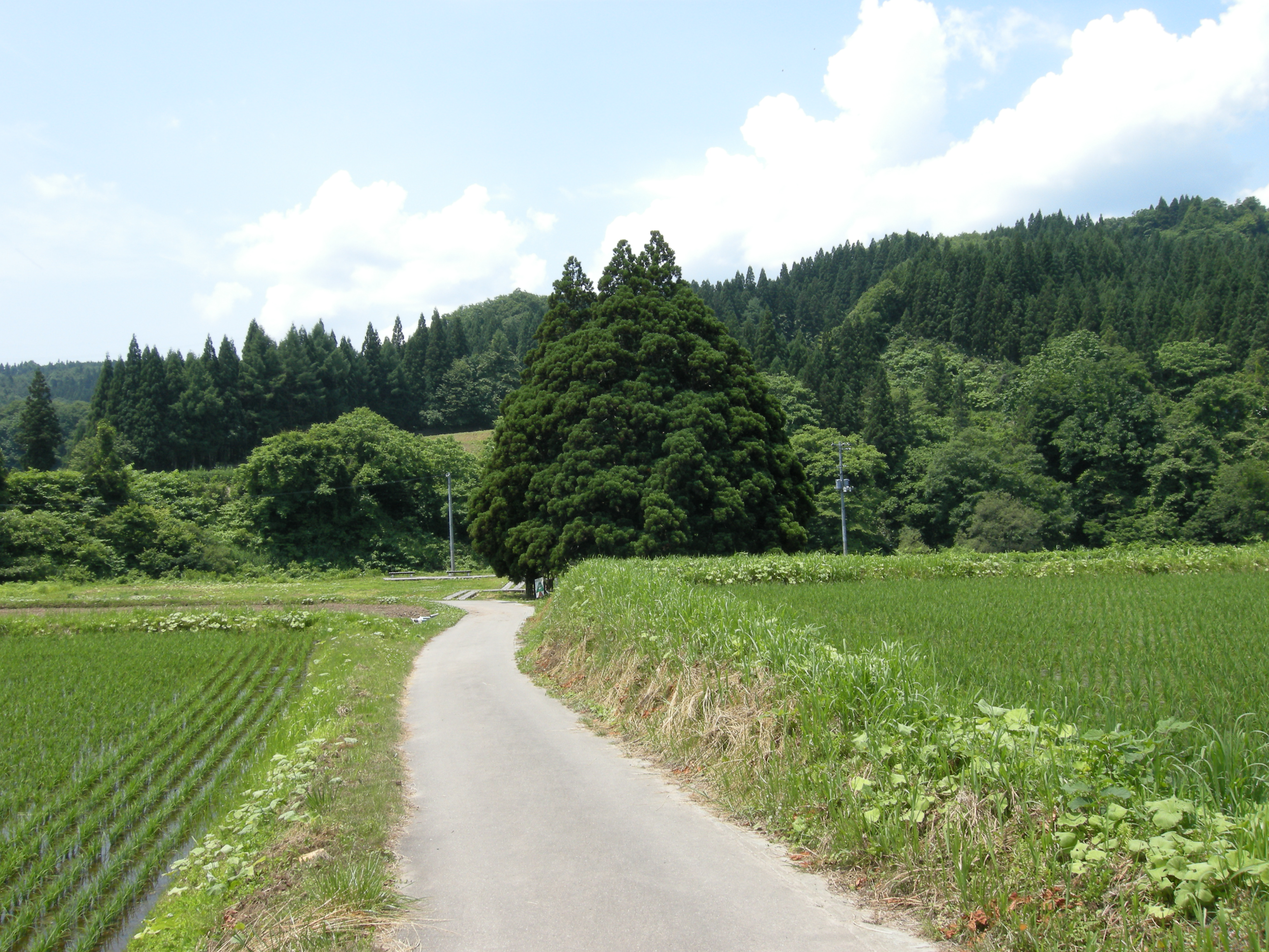 真中がトトロの木